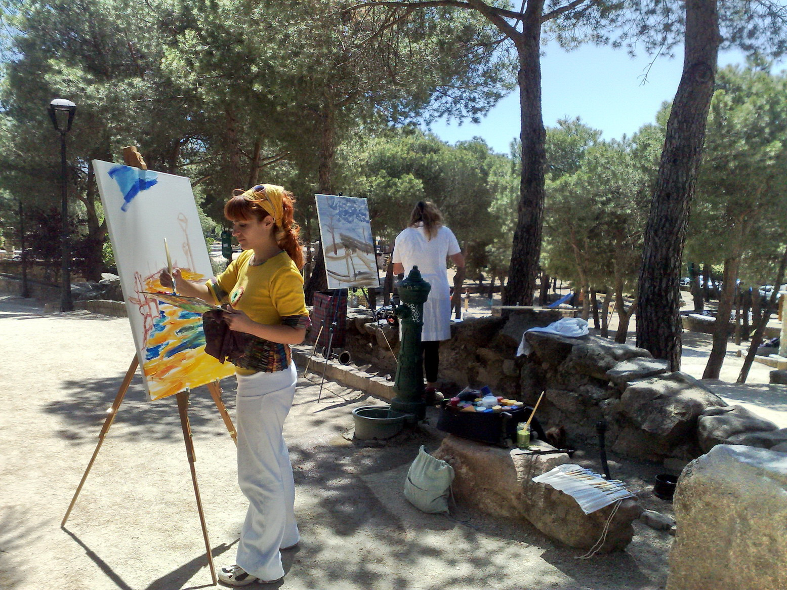 Torrelodones. X Certamen de Pintura en directo Rafael Botí. Concursantes pintando paisajes en el Parque JH.